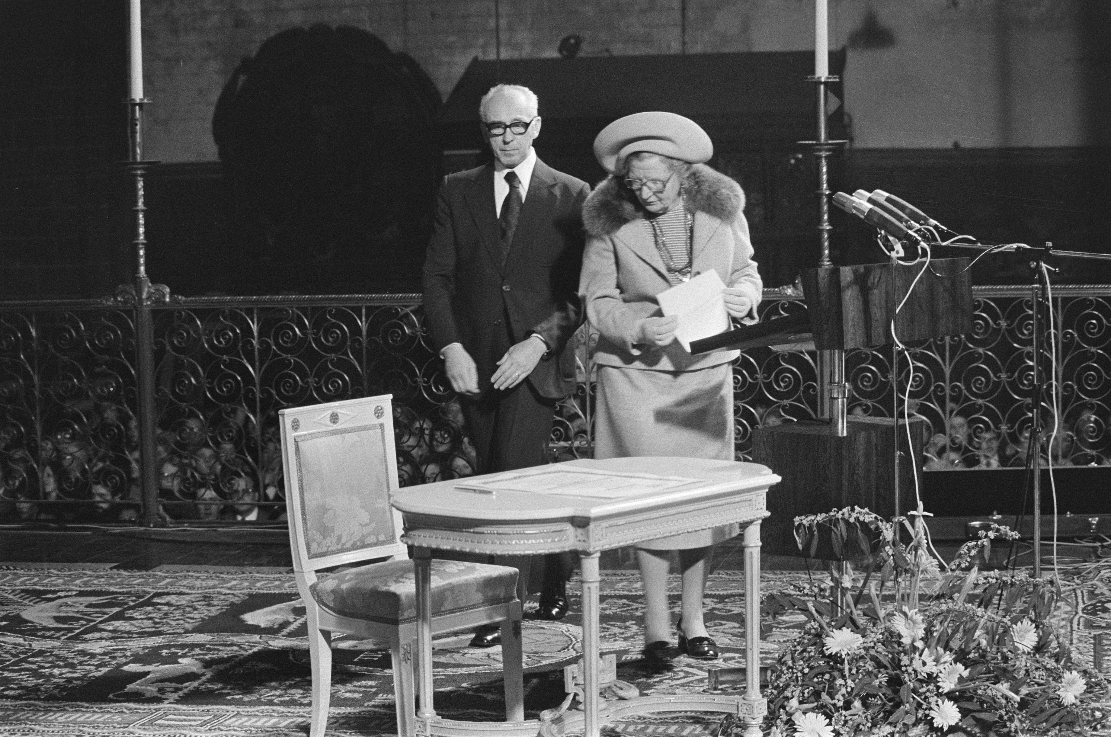 Collectie / Archief : Fotocollectie Anefo Reportage / Serie : [ onbekend ] Beschrijving : Hare Majesteit opent Rijksuniversiteit in Maastricht; koningin Juliana tekent, na toespraak Datum : 9 januari 1976 Locatie : Limburg, Maastricht Trefwoorden : koninginnen, openingen, toespraken, universiteiten Persoonsnaam : Juliana, koningin Fotograaf : Mieremet, Rob / Anefo Auteursrechthebbende : Nationaal Archief Materiaalsoort : Negatief (zwart/wit) Nummer archiefinventaris : bekijk toegang 2.24.01.05 Bestanddeelnummer : 928-3537